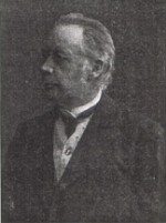 Schriftsteller und Amateurfotograf